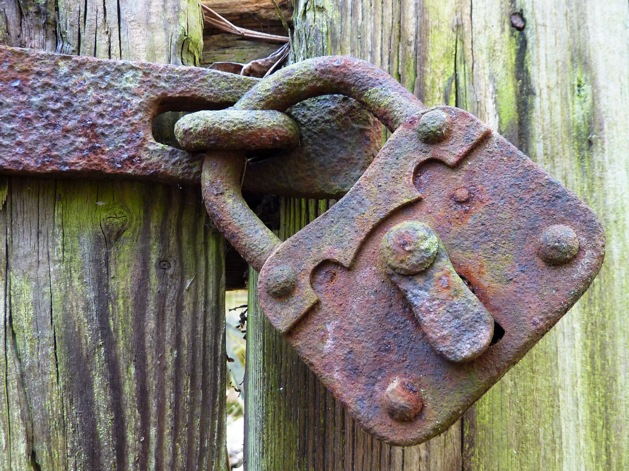 Rostiges Vorhängeschloss an einem verfallenen landwirtschaftlichen Gebäude in Munster (Örtze), Deutschland.